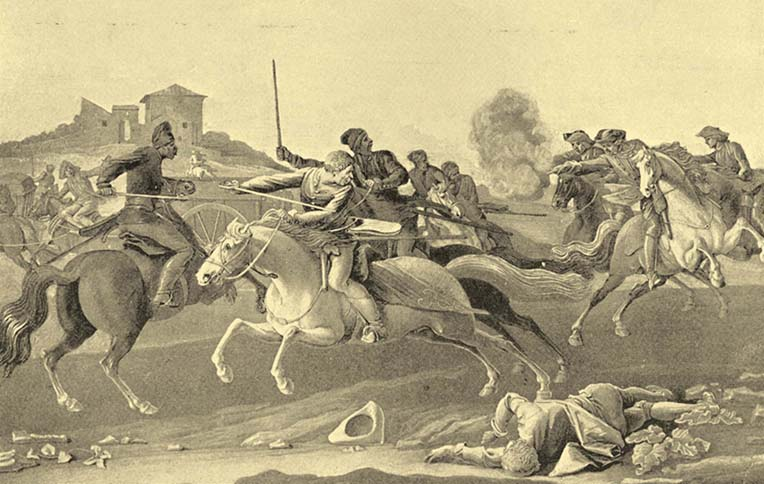 Csatajelenet a kurucz világból. Rugendas György Fülöp egykorú metszete után. A Lanfranconi-gyűjteménynek az országos képtárban levő példányáról